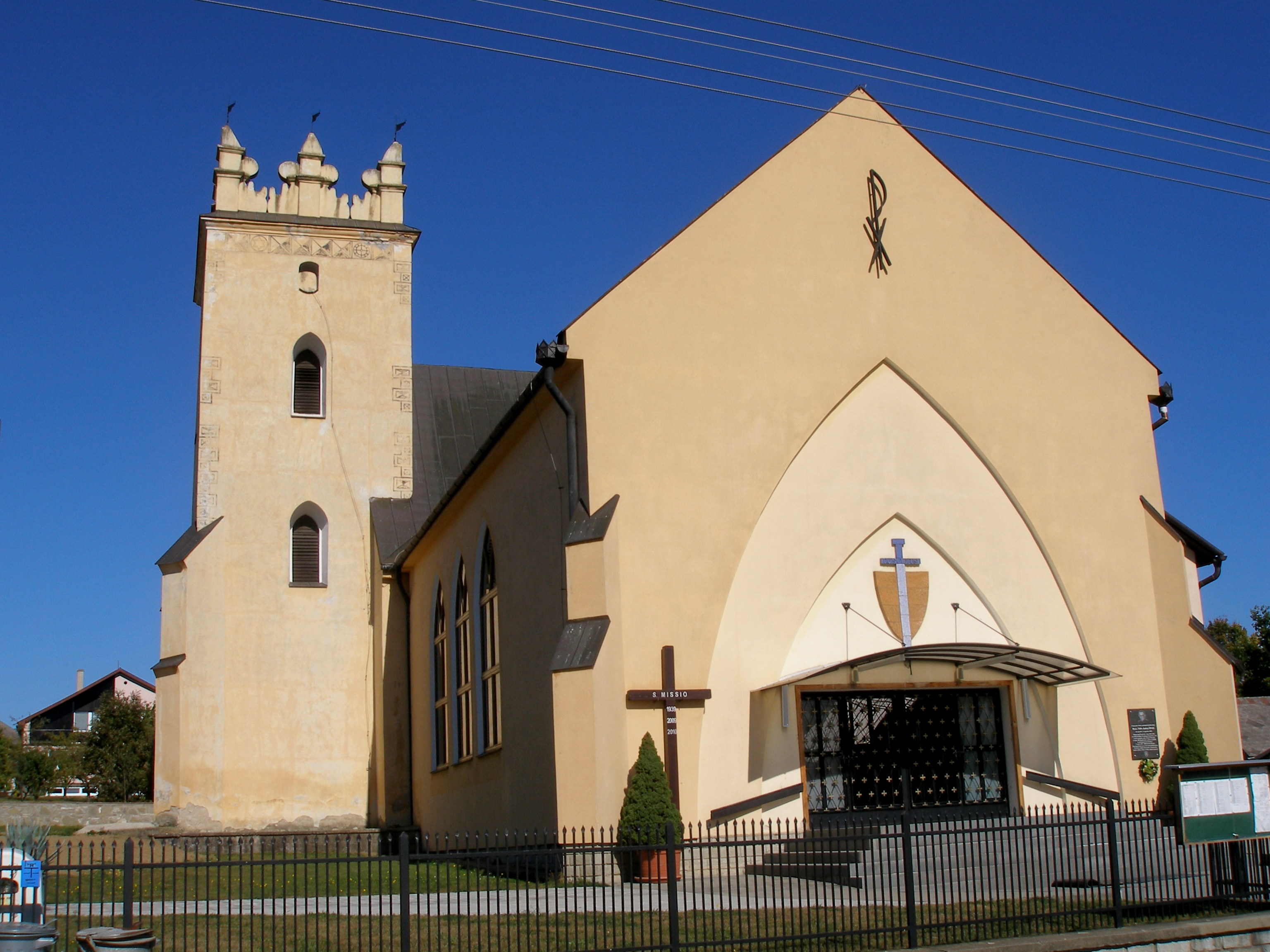 Obec Osikov okres Bardejov